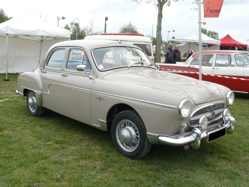 Mantes la Jolie 2012